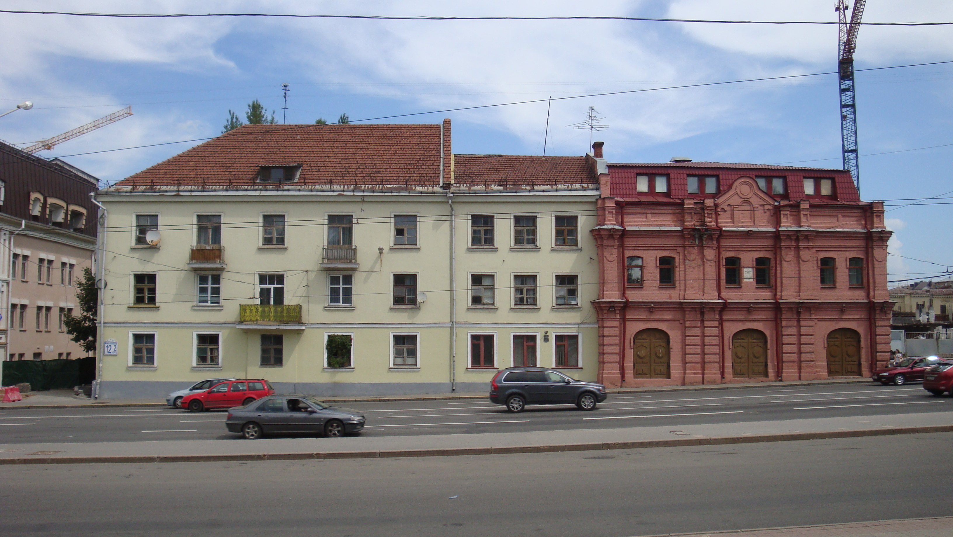 Гарадскі вал